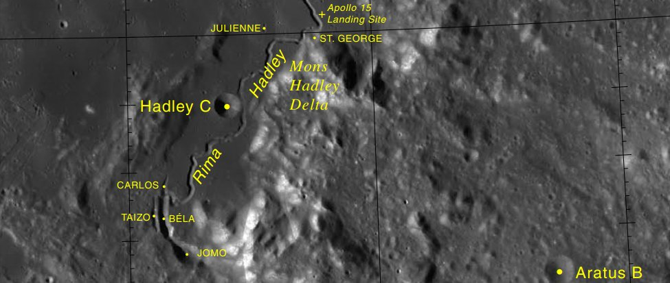 Mons Hadley. Localización de los cráteres cercanos. (Imagen LRO)